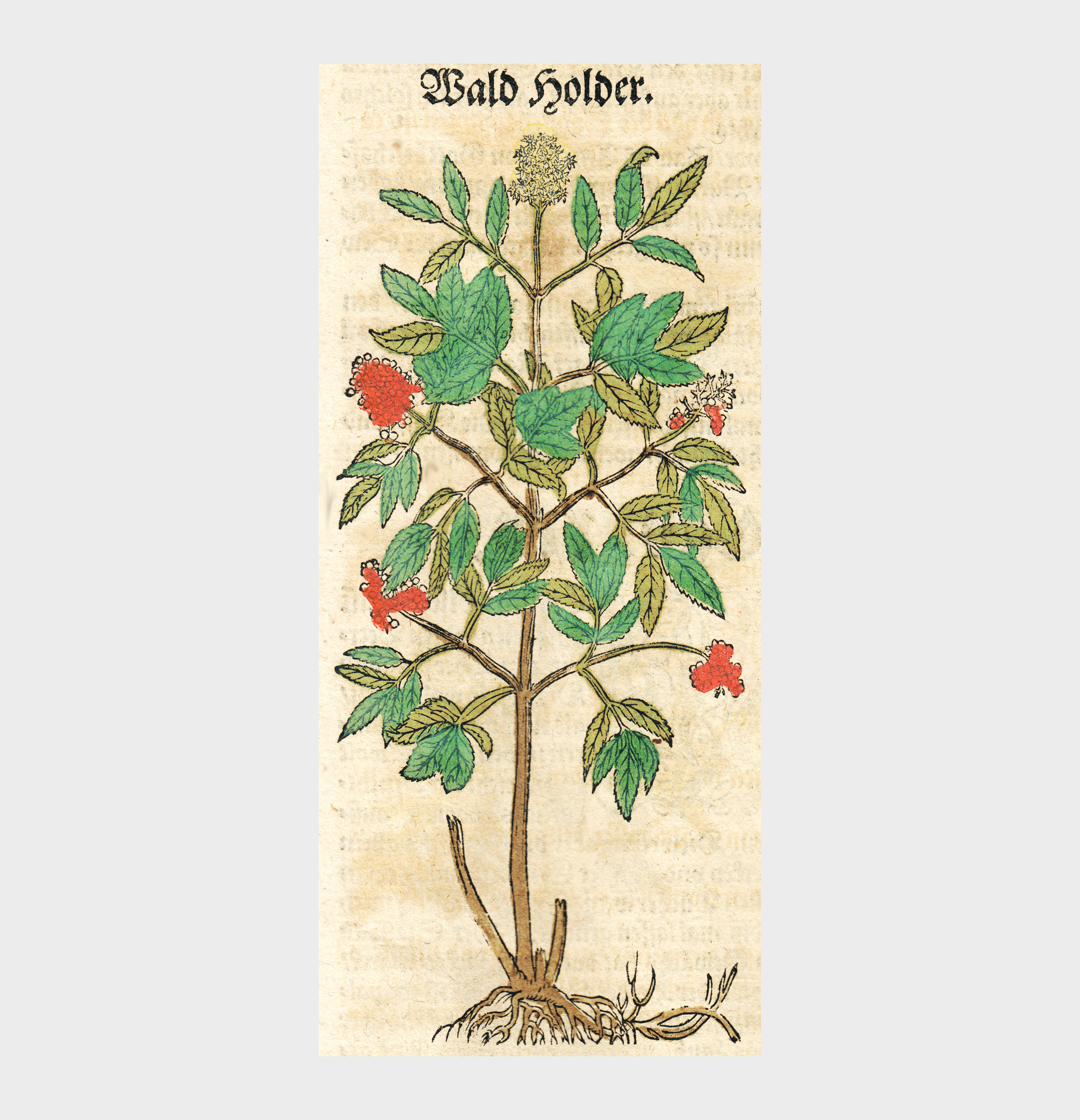 Abbildung des Waldholunders